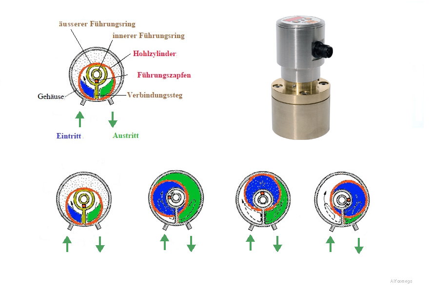 Funktion-Skizze Ringkolbenzähler